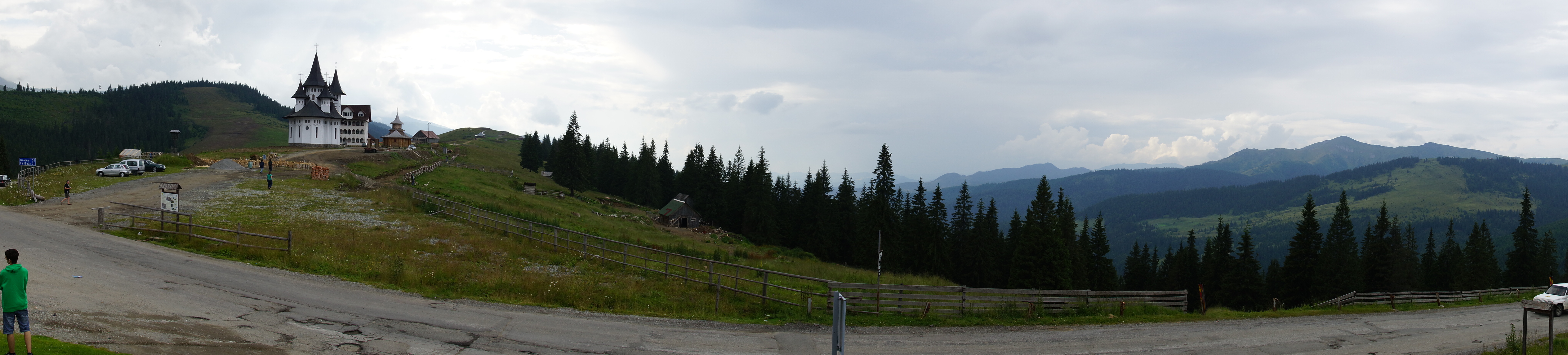 Zdjęcie przedstawia przełęcz Prislop w Rumunii.